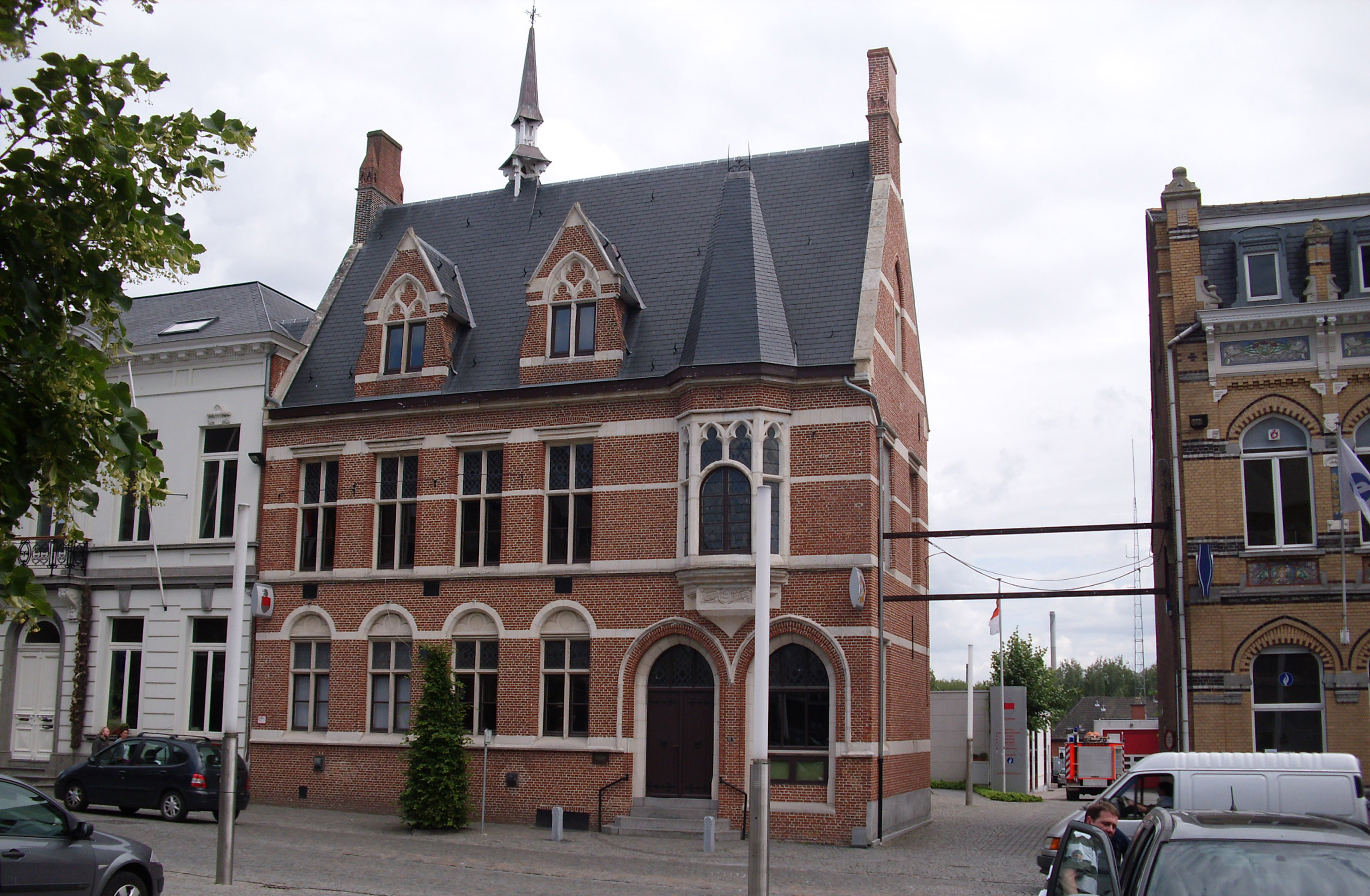 Een deel van het gemeentehuis van Kruibeke - Oost-Vlaanderen - Vlaanderen - België